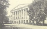 Ново-Екатерининская больница - здание (на углу улицы Петровки и Страстного бульвара).